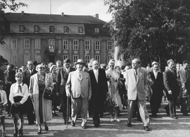 Eröffnung des Tierparks Berlin, mit Wilhelm Pieck Zentralbild/Weiß 2.7.1955 Feierliche Eröffnung der Berliner Tierparks Am 2. Juli 1955 wurde in Anwesenheit des Präsidenten der Deutschen Demokratischen Republik, Wilhelm Pieck, und des Oberbürgermeisters von Groß-Berlin, Friedrich Ebert, der erste Teilabschnitt des neuen Tierparks in Berlin-Friedrichsfelde mit einer Fläche von 60 ha eröffnet. Viele Berliner hatten sich eingefunden um dem festlichen Ereignis beizuwohnen. UBz.: Präsident Wilhelm Pieck (Mitte) und (4. von rechts) Oberbürgermeister Friedrich Ebert beim Rundgang durch den Tierpark. (Rechts neben dem Präsidenten) der Direktor des Tierparks, Dr. Dathe. Abgebildete Personen: Pieck, Wilhelm: Präsident, Politbüro der SED, Vorsitzender der KPD, DDR Ebert, Friedrich: Oberbürgermeister von Berlin, DDR Dathe, Heinrich Prof. Dr.: Direktor des Tierparks Berlin-Friedrichsfelde, DDR